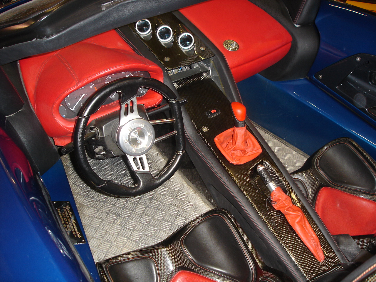 Innenraum eines Attack K1